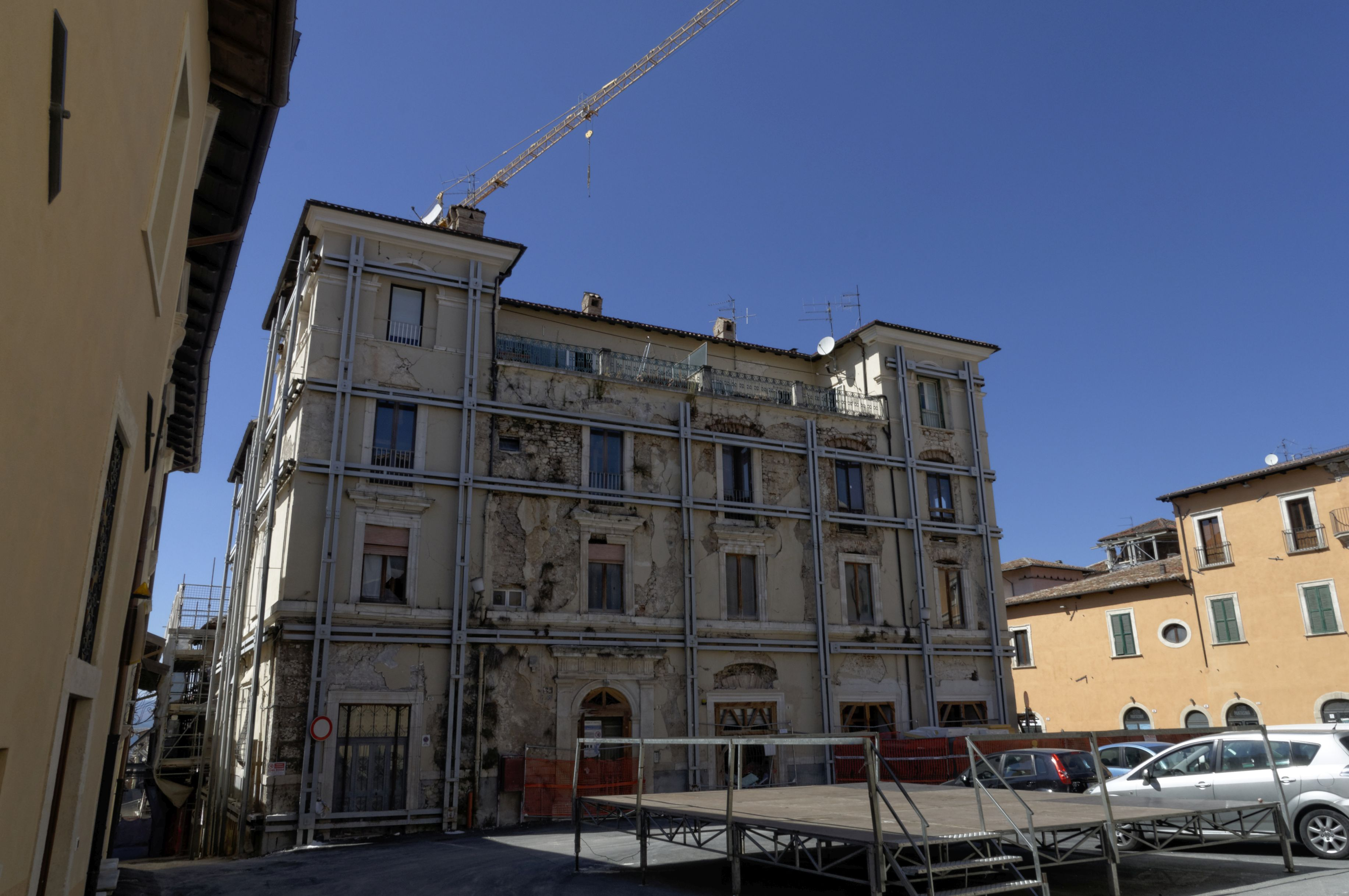 L'Aquila 2017 Dieses Foto entstand in Zusammenarbeit mit Stadtbesichtigungen.de Die Seiten Stadtbesichtigungen.de, der dazugehörige Reise Blog sowie die Facebookseite: Stadtbesichtigungen Rom dürfen dieses Bild für Ihre Veröffentlichungen ohne den Hinweis auf Wikipedia, Commons bzw der Lizenz verwenden. Die Verantwortlichen habe von mir (Ra Boe) die Originaldaten zur freien Verfügung übermittelt bekommen.